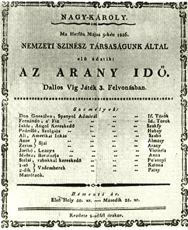 Arany János rövid színészéletének dokumentuma: színlap Nagykárolyból